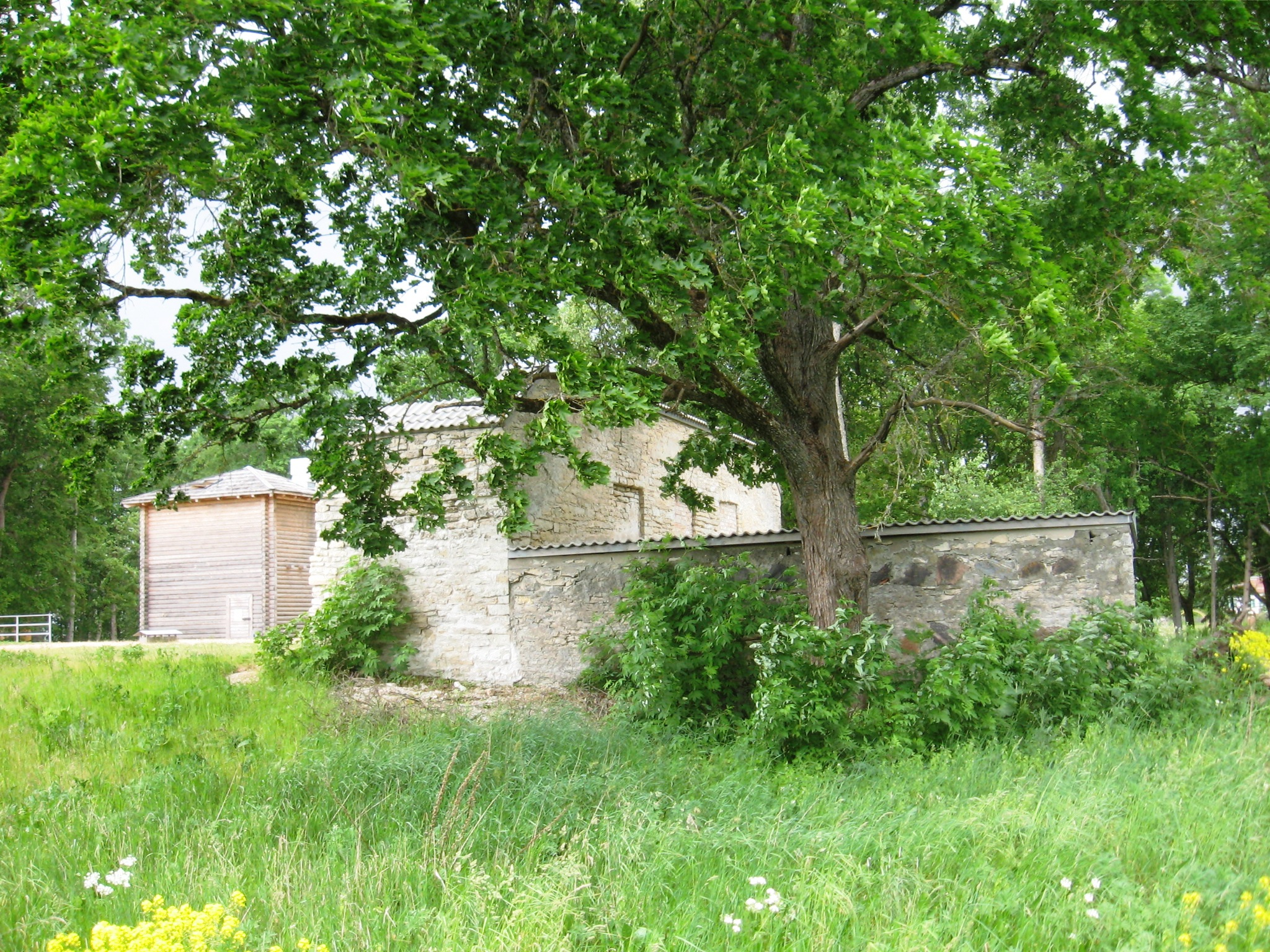 Müüsleri mõisa varemed ja Kilplala hoone